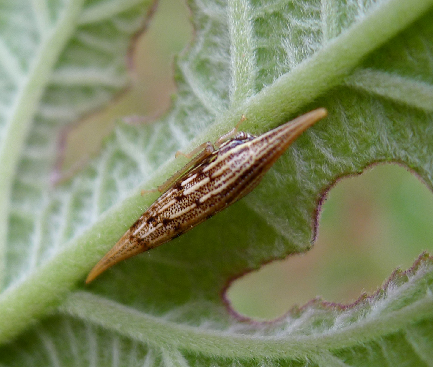 Orden: Hemiptera Familia: Membracidae Especie: Polyglypta ?